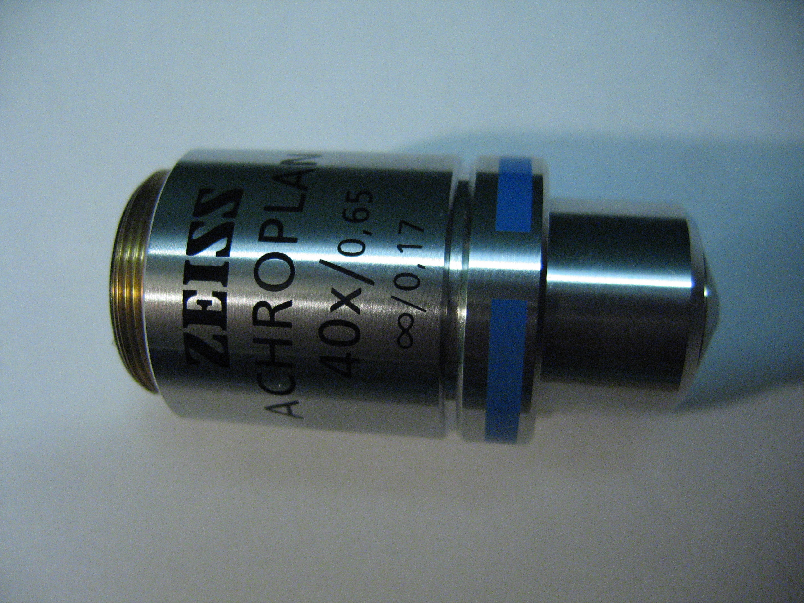 Objectif de microscope